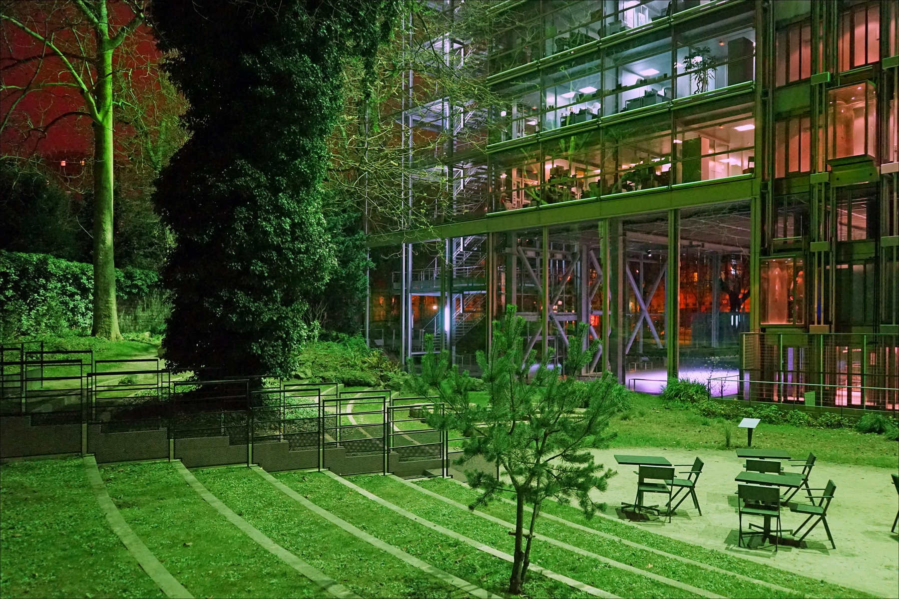 Le Theatrum Botanicum de nuit pour les 30 ans de la Fondation Cartier pour l'art contemporain Le jardin de la Fondation Cartier pour l’art contemporain n’est ni un parc à l’anglaise, ni un jardin à la française, ni même un parc de sculptures mais une œuvre commandée à l’artiste Lothar Baumgarten. Il emprunte son nom, Theatrum Botanicum, aux livres dans lesquels les moines inventoriaient les plantes médicinales et aromatiques au Moyen Âge.... En dessinant ce jardin, Lothar Baumgarten a créé une harmonie de mesures et de proportions entre le bâtiment de Jean Nouvel (1994) et l’ancien mur qui enclôt le parc et qui garde l’écho des promenades de Chateaubriand qui vécut sur ces lieux. Extraits du site officiel